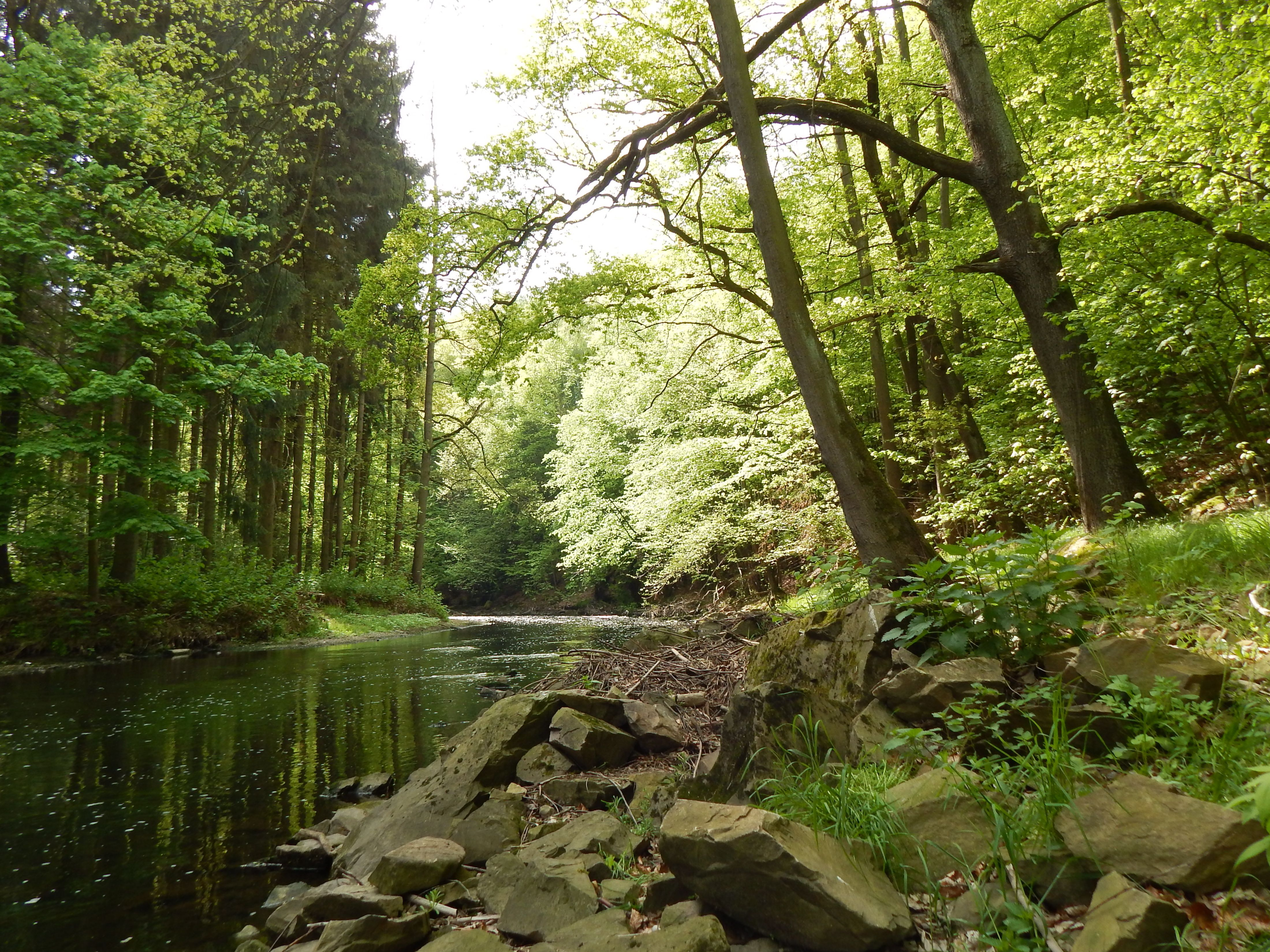 Chemnitzfluss unterhalb vom Schusterstein